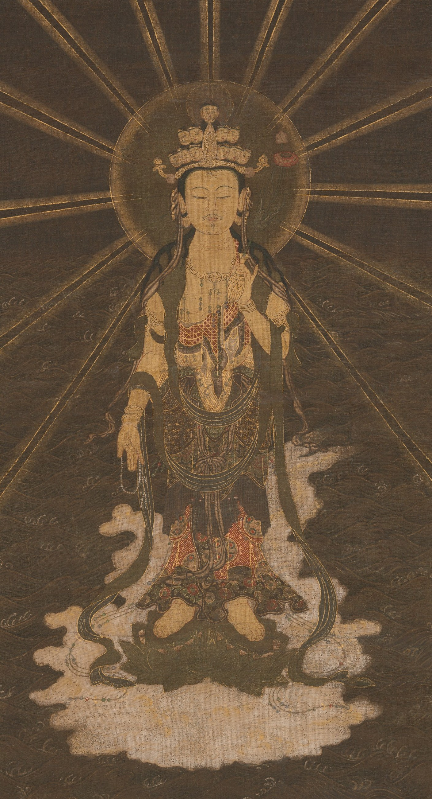 Japan; Hanging scroll; Paintings